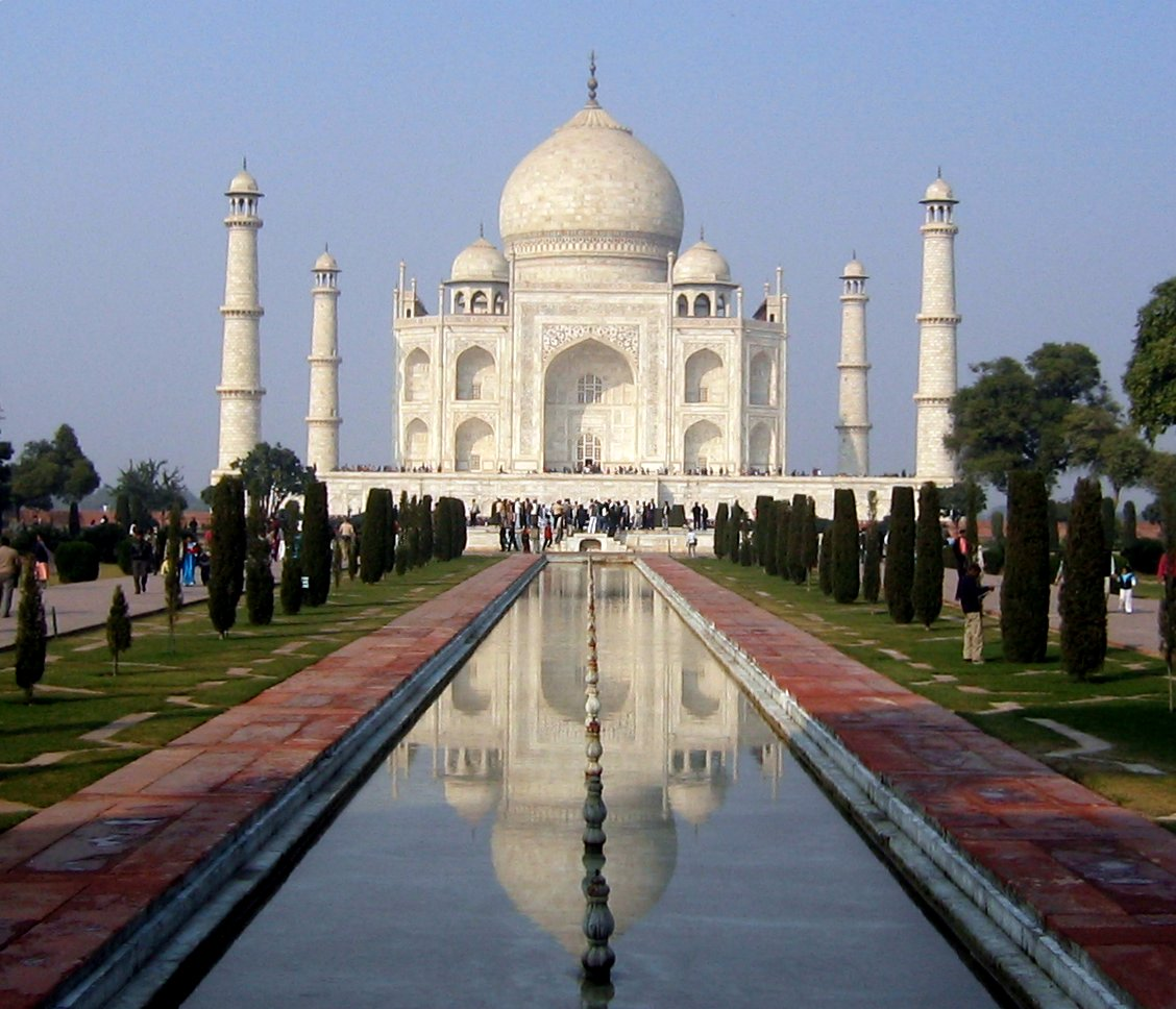 Taj Mahal, Agra, India - foto con reflejo en el agua.